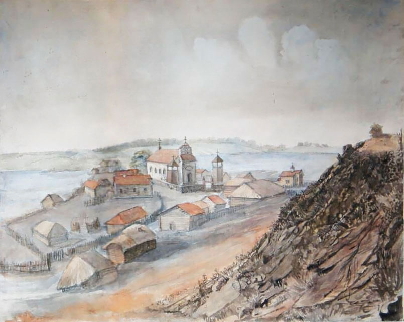 Беларуская (тарашкевіца): Браслаў (Brasłaŭ). Касьцёл і Замкавая гара